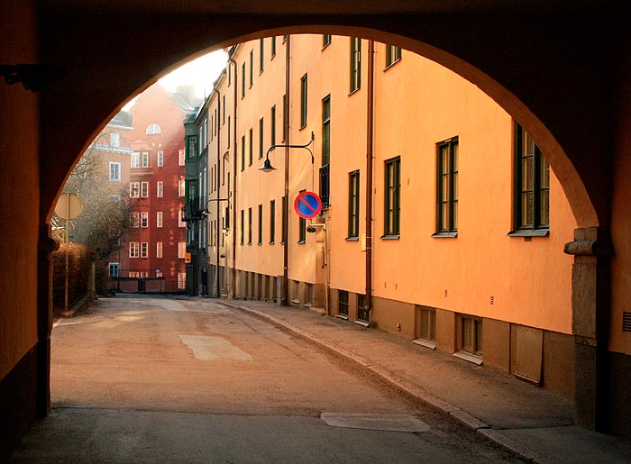 En bild av Blomsterfondens hus på Röda bergen i Stockholm. Från Rödabegsgatan. Sätertappan på andra sidan portiken